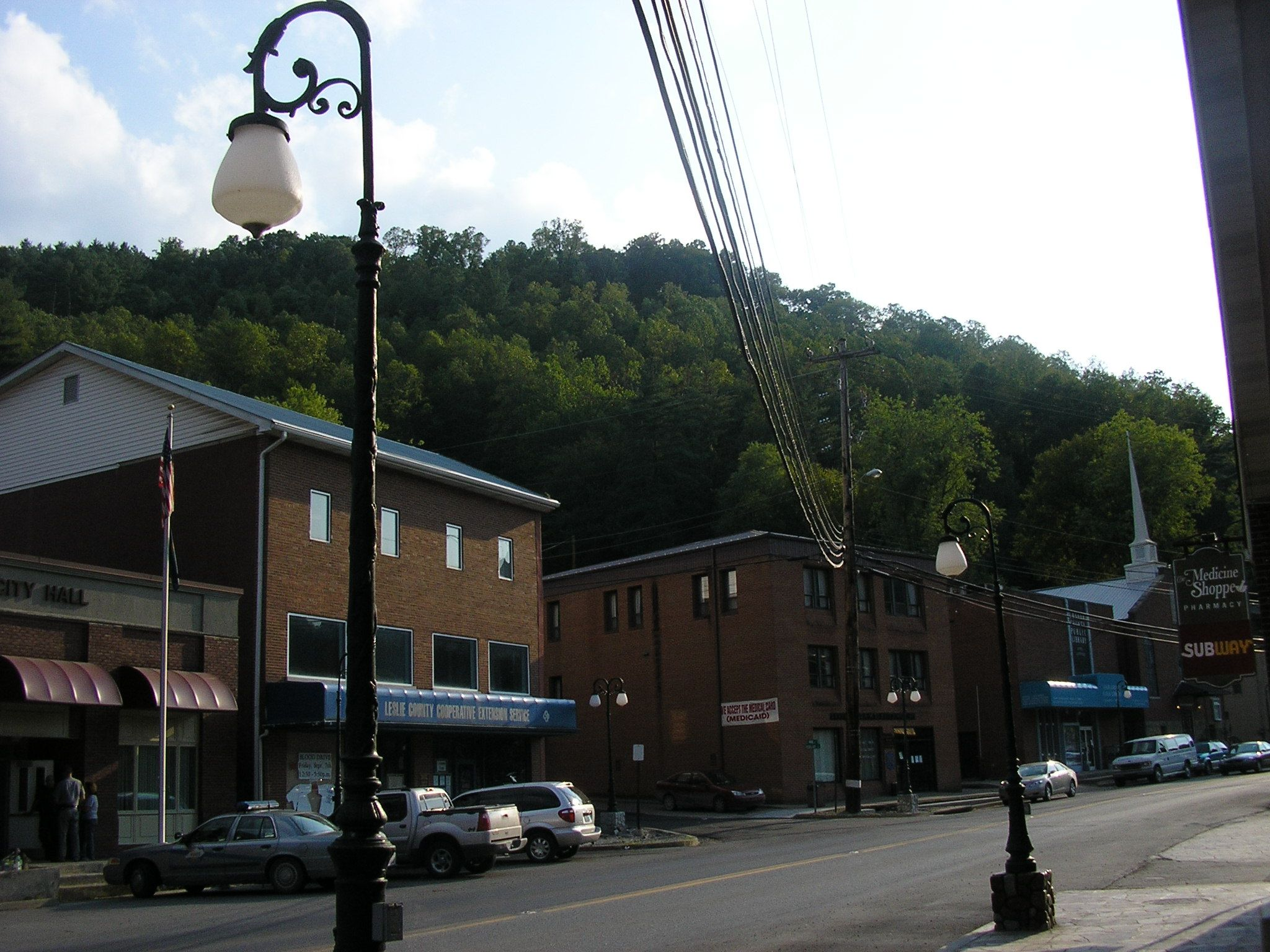 Hyden, Kentucky USA